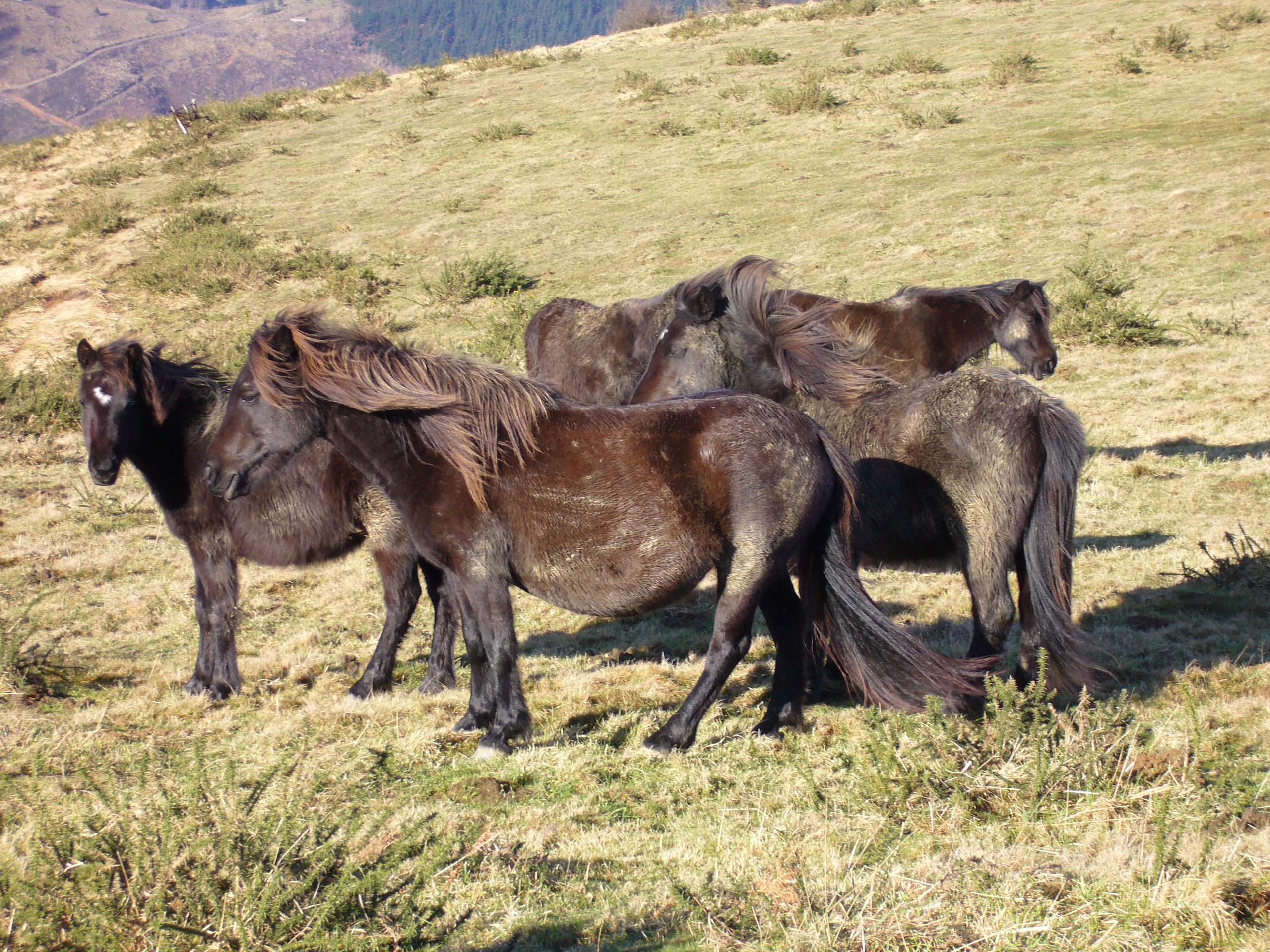 Pottokak Pagoetako parke naturalean